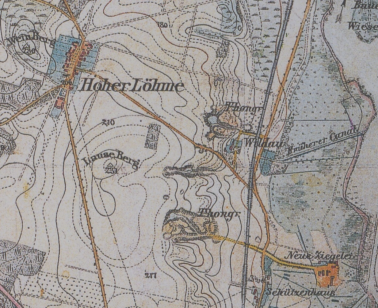 Hoherlehme, Gemeindeteil der Stadt Wildau, Lkr. Dahme-Spreewald, Brandenburg, Ausschnitt aus dem Messtischblatt Zeuthen 3647 von 1869